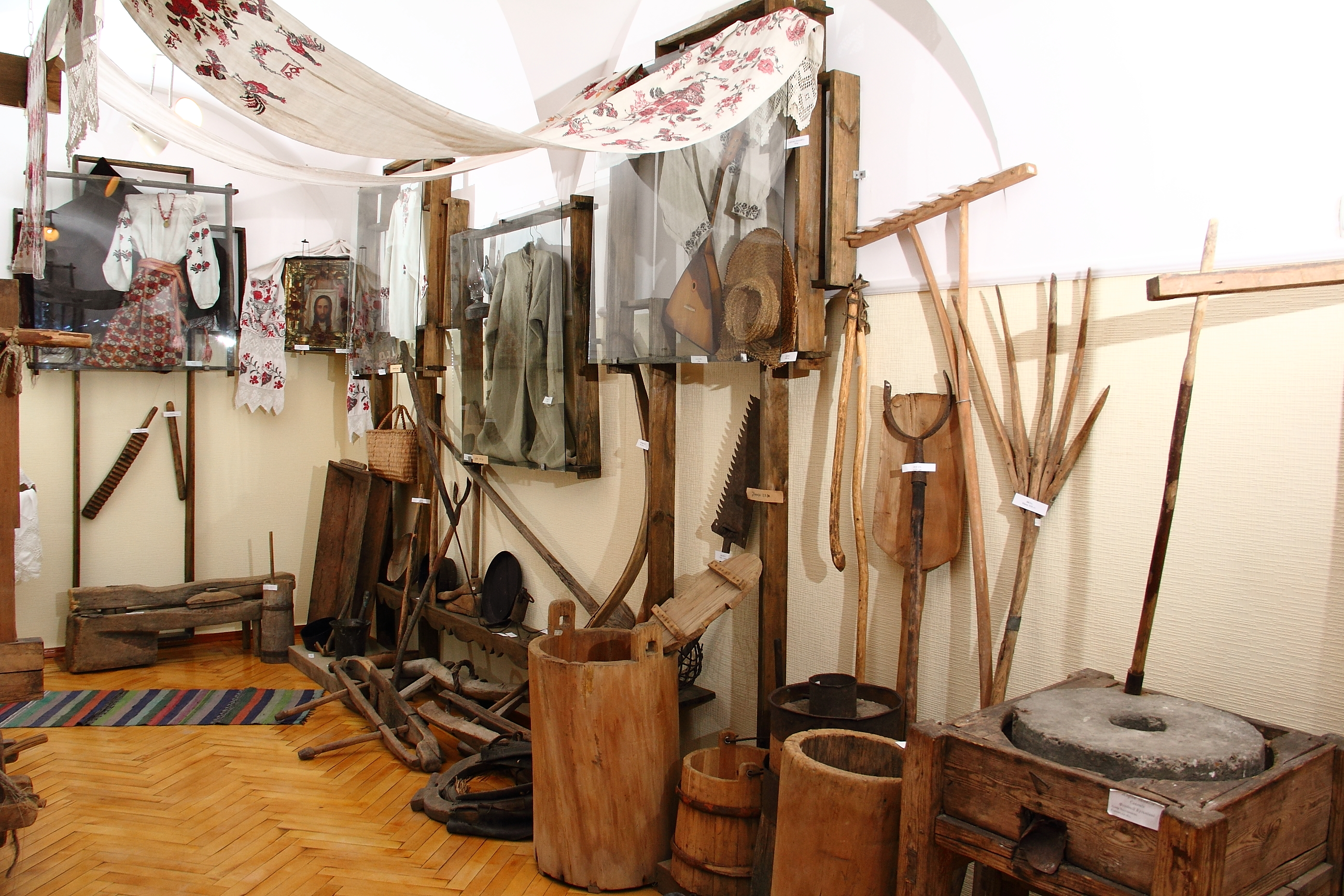 Експозиція «Етнографія рідного краю» Балаклійського краєзнавчого музею